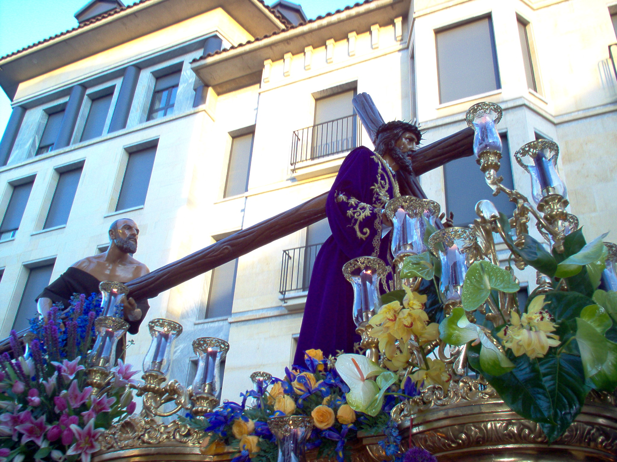 Paso de Nuestro Padre Jesús Nazareno, titular de la Cofradía del Dulce Nombre de Jesús Nazareno, de León, España, durante la Procesión de los Pasos el Viernes Santo, 14 de abril de 2006